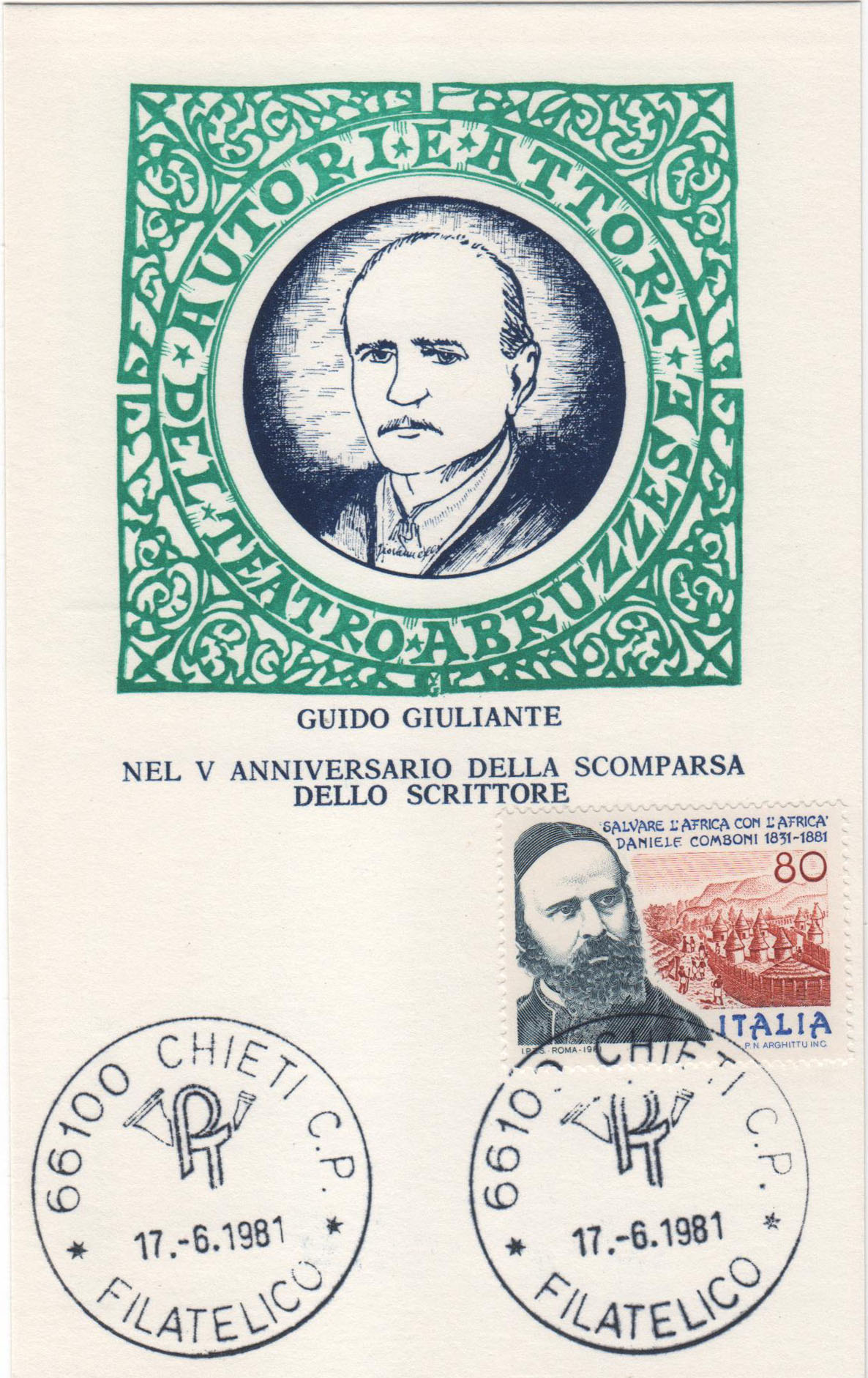 Immagine fotografata dall'album di famiglia che ne ha autorizzato l'uso.